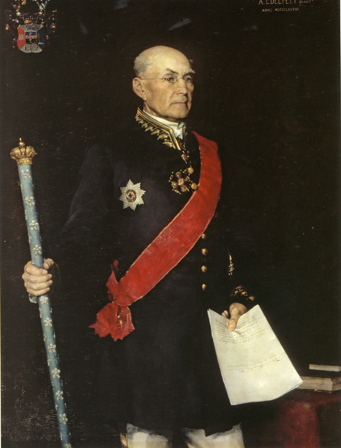 Land Marshall Johan August von Born